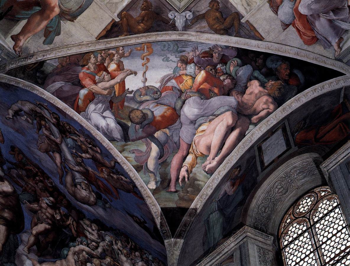 MICHELANGELO Buonarroti The Brazen Serpent Fresco, 585 x 985 cm Cappella Sistina, Vatican